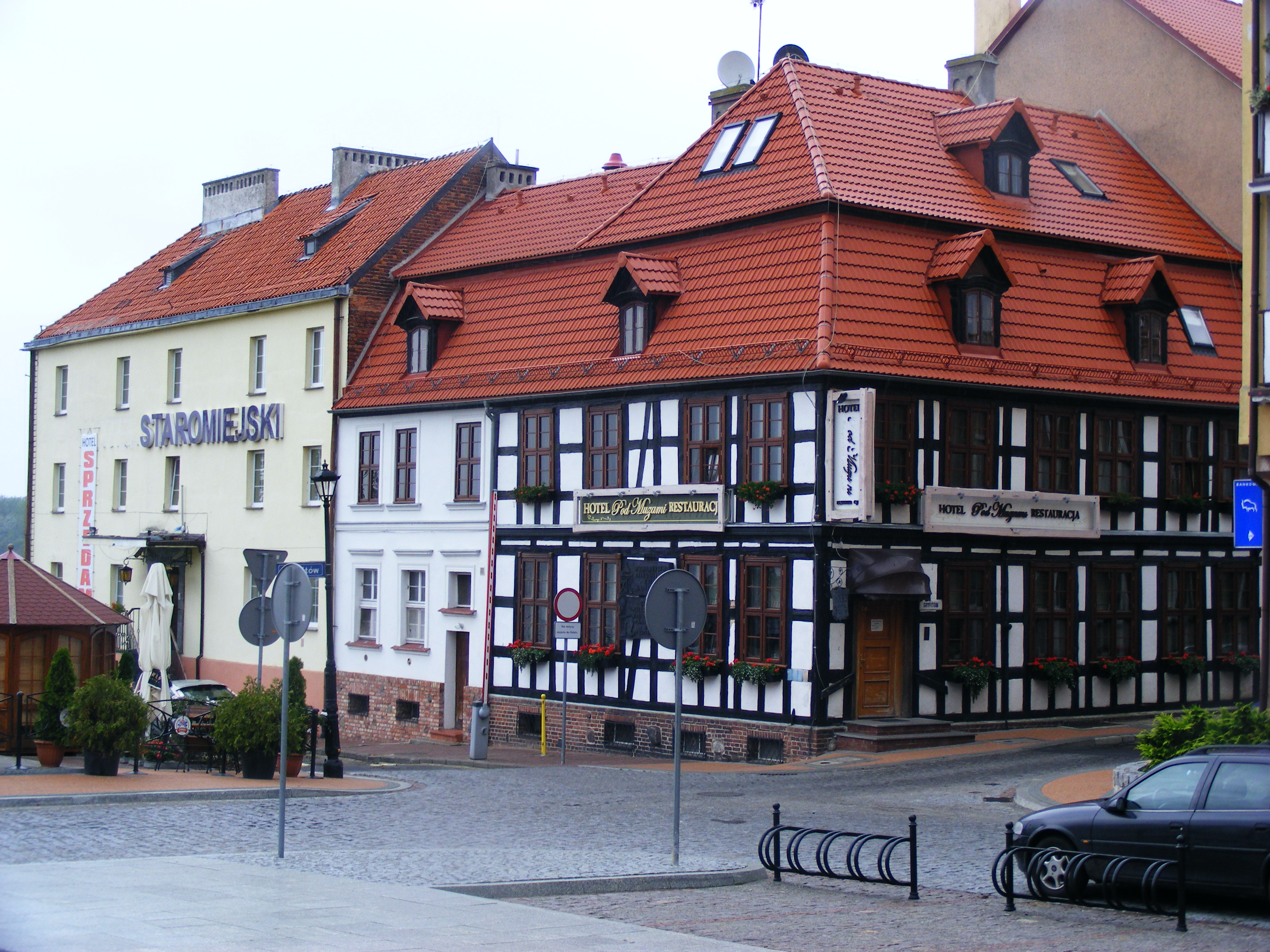 Hotel Pod Muzami. Kamień Pomorski, ul. Gryfitów 1.